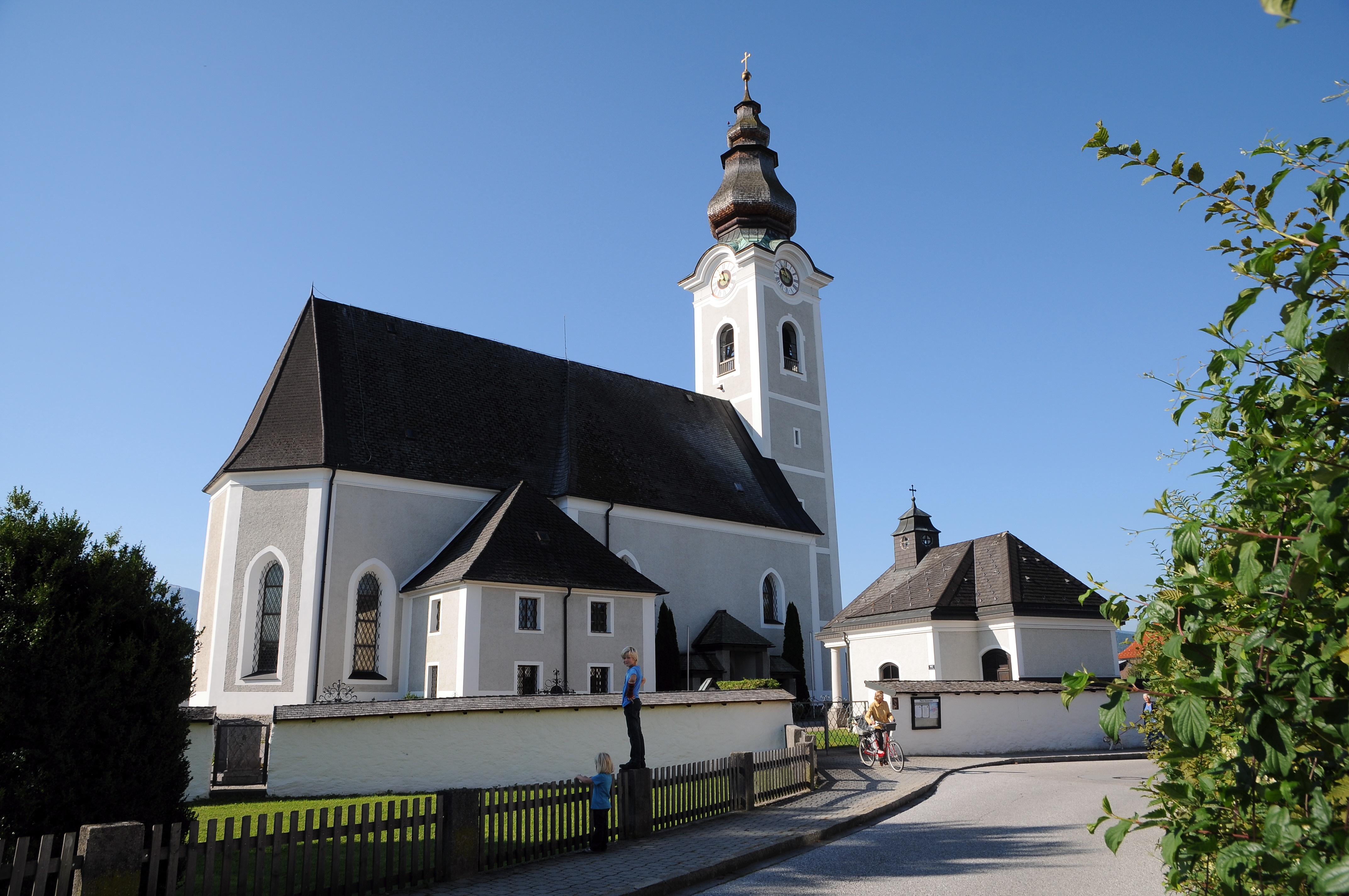 Die römisch-katholische Pfarrkirche Siezenheim zu unserer Lieben Frau Mariae Geburt befindet sich in der Gemeinde Wals-Siezenheim in der Nähe von Salzburg, sie wurde zwischen 1500 und 1506 erbaut und am 15. April 1506 von Weihbischof Nikolaus Kaps eingeweiht. Der heutige Kirchturm wurde 1735 errichtet.